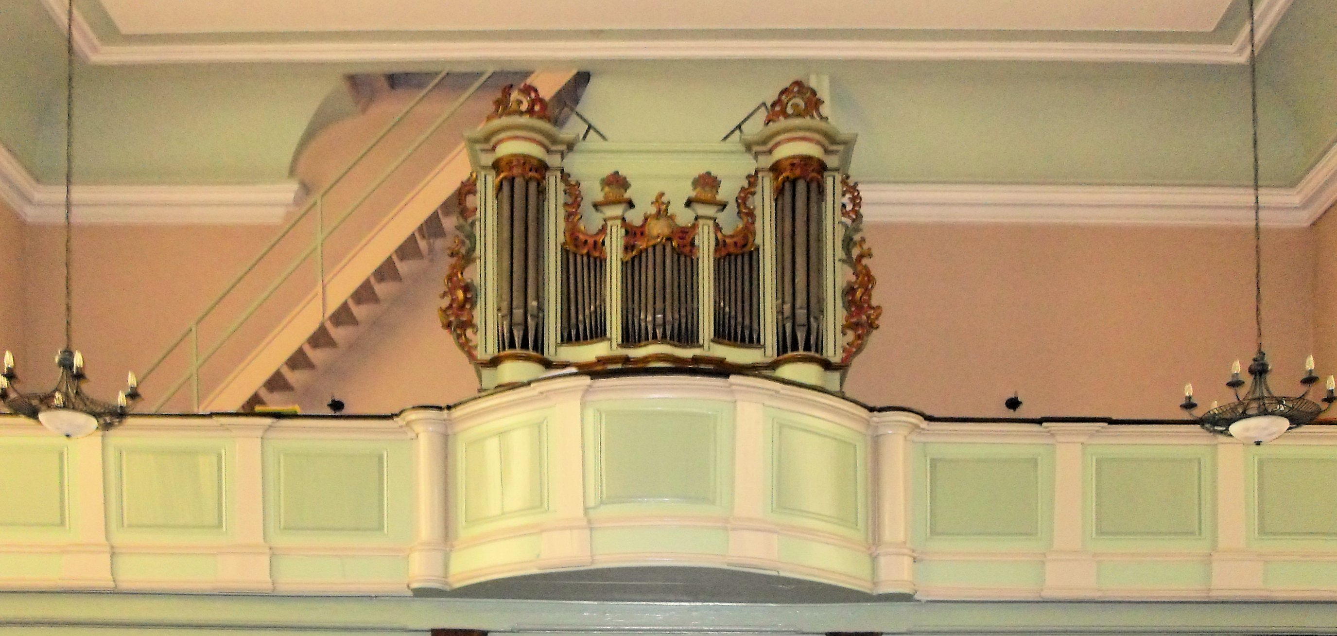 L'orgue par Louis Dubois à partir de 1759 dans d'église Saint-Nicolas d'Oberentzen